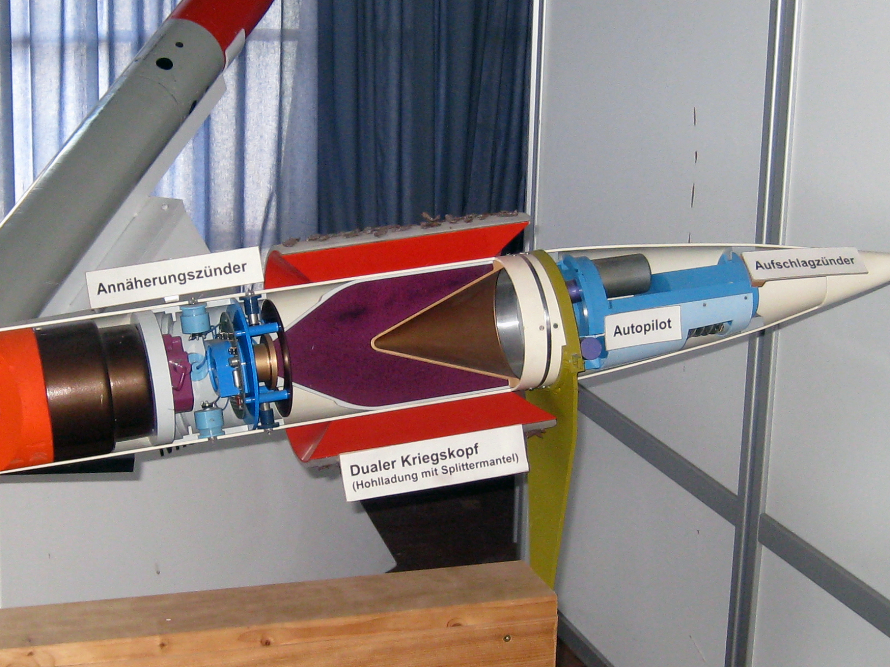 Modell der Lenkwaffe ADATS im Militärmuseum Full